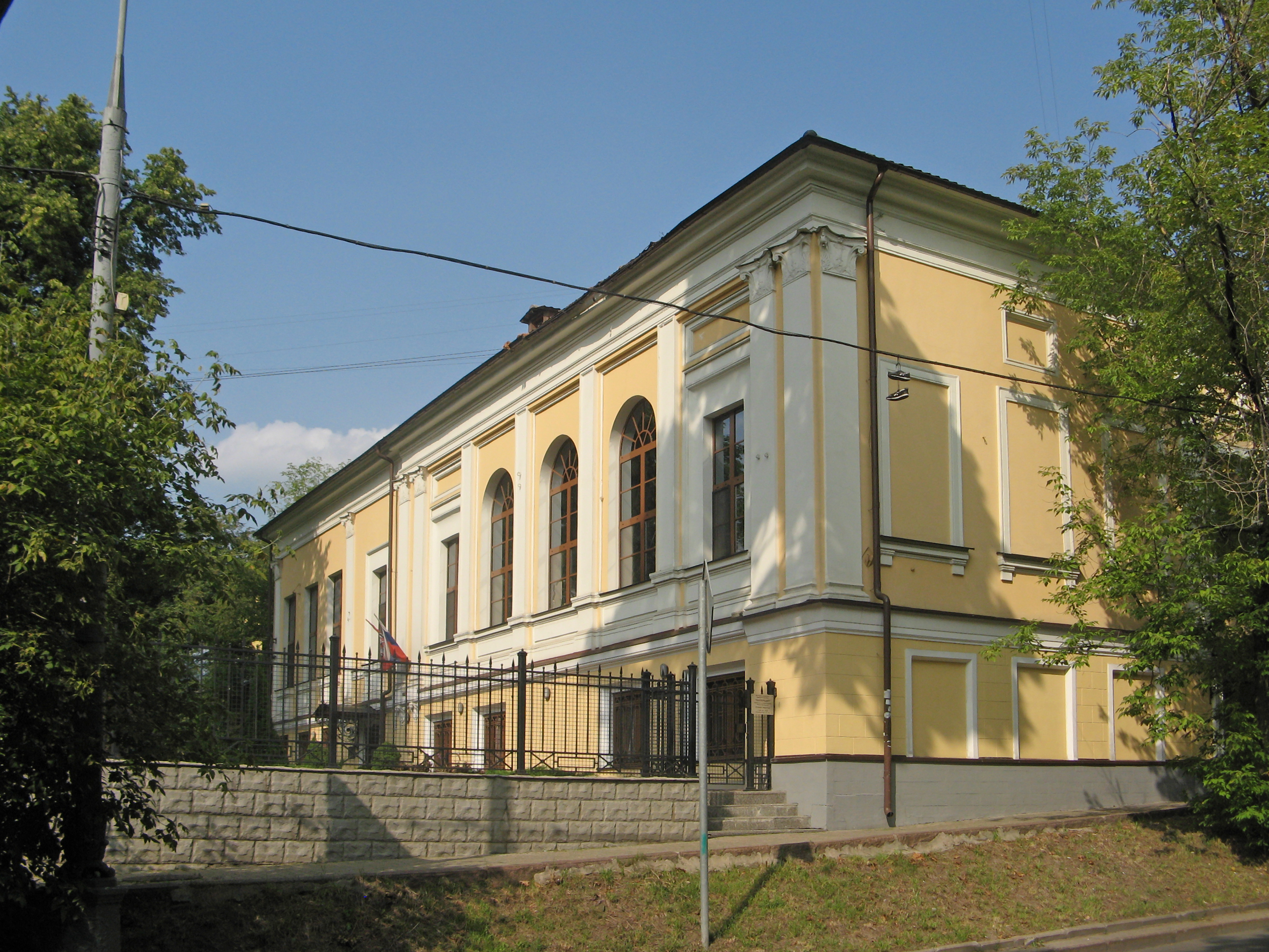 Городская усадьба Е. П. Носовой: Семёновская Малая ул., дом 1, строение 1, Преображенское, Восточный округ, Москва